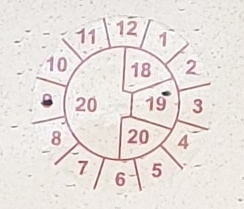 Nalepka oznaczająca termin ważności tymczasowej tablicy rejestracyjnej wydanej w Polsce.